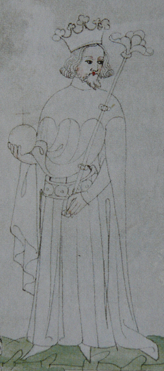 Jan Lucemburský